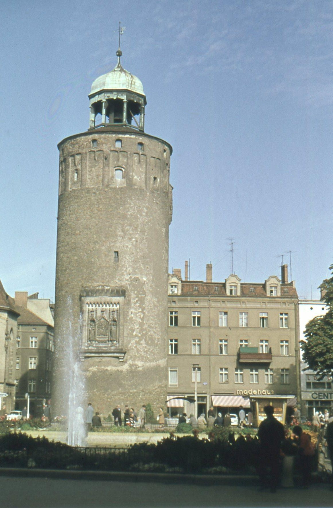 Frauenturm (Dicker Turm) auf dem Marienplatz in den 1970er Jahren